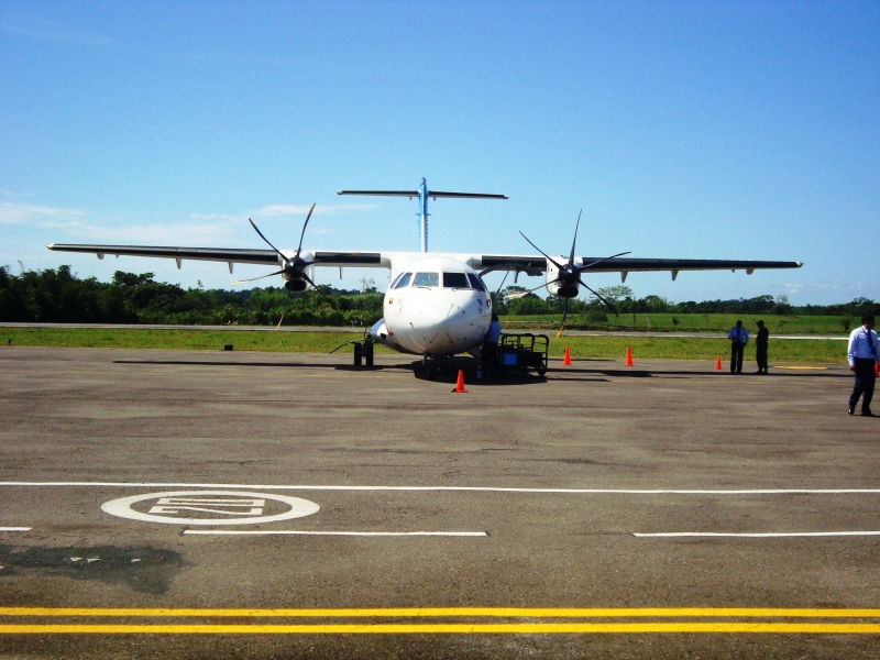 ATR42-500 de Satena en el aeropuerto Gustavo Artunduaga de Florencia (Caquetá)